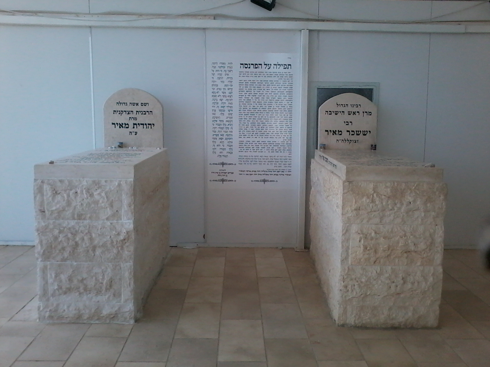 קבר הרב יששכר מאיר ורעייתו יהודית בנתיבות